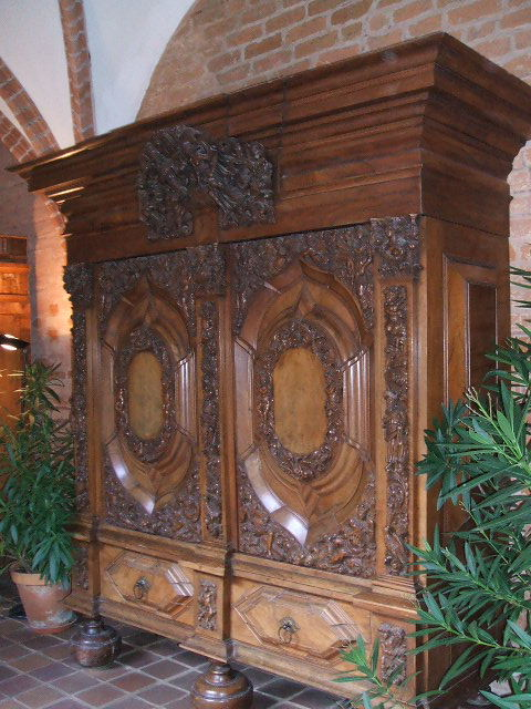 Das Foto zeigt Exponate im Kulturhistorischen Mseum in Stralsund in Stralsund im März 2007.